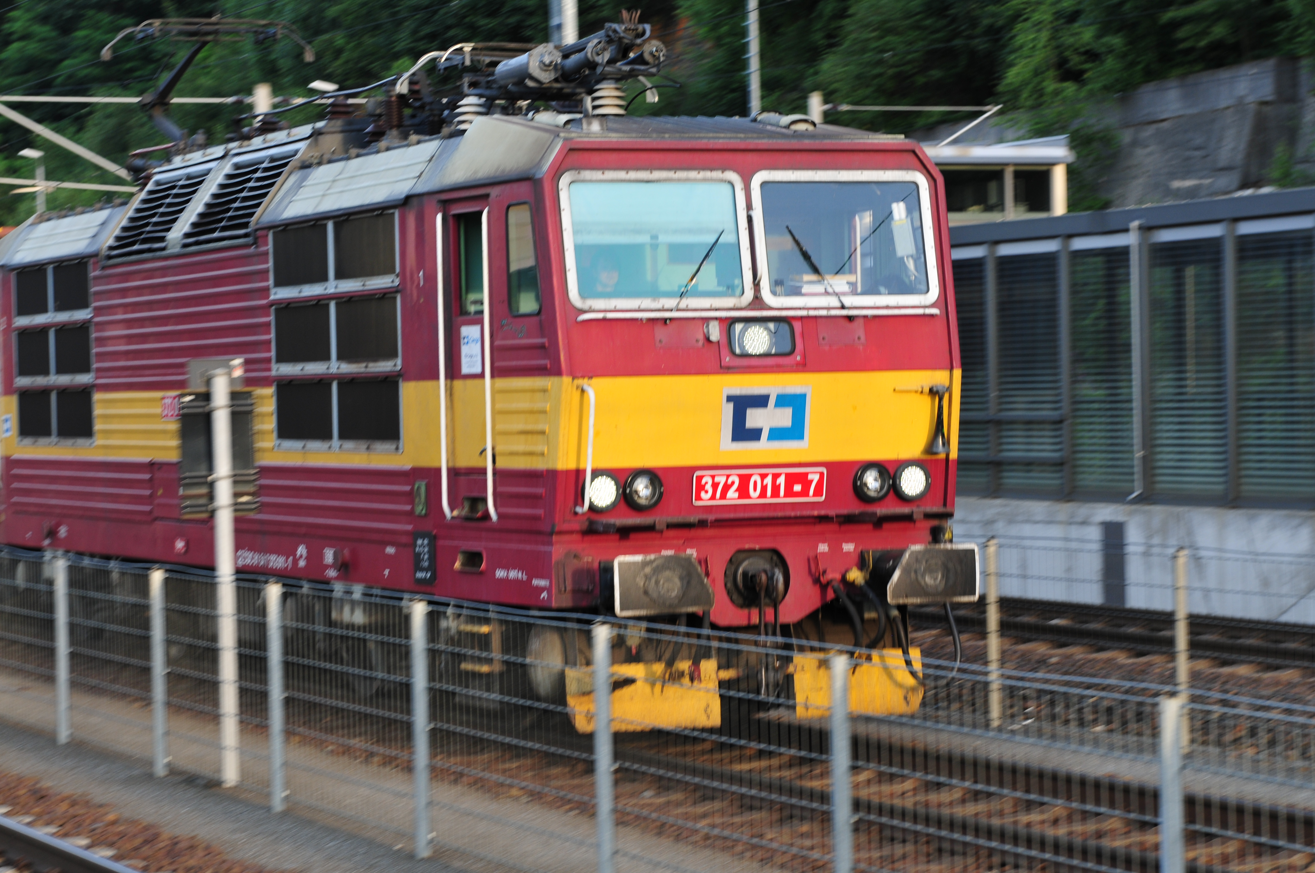 Bahnhof Bad Schandau